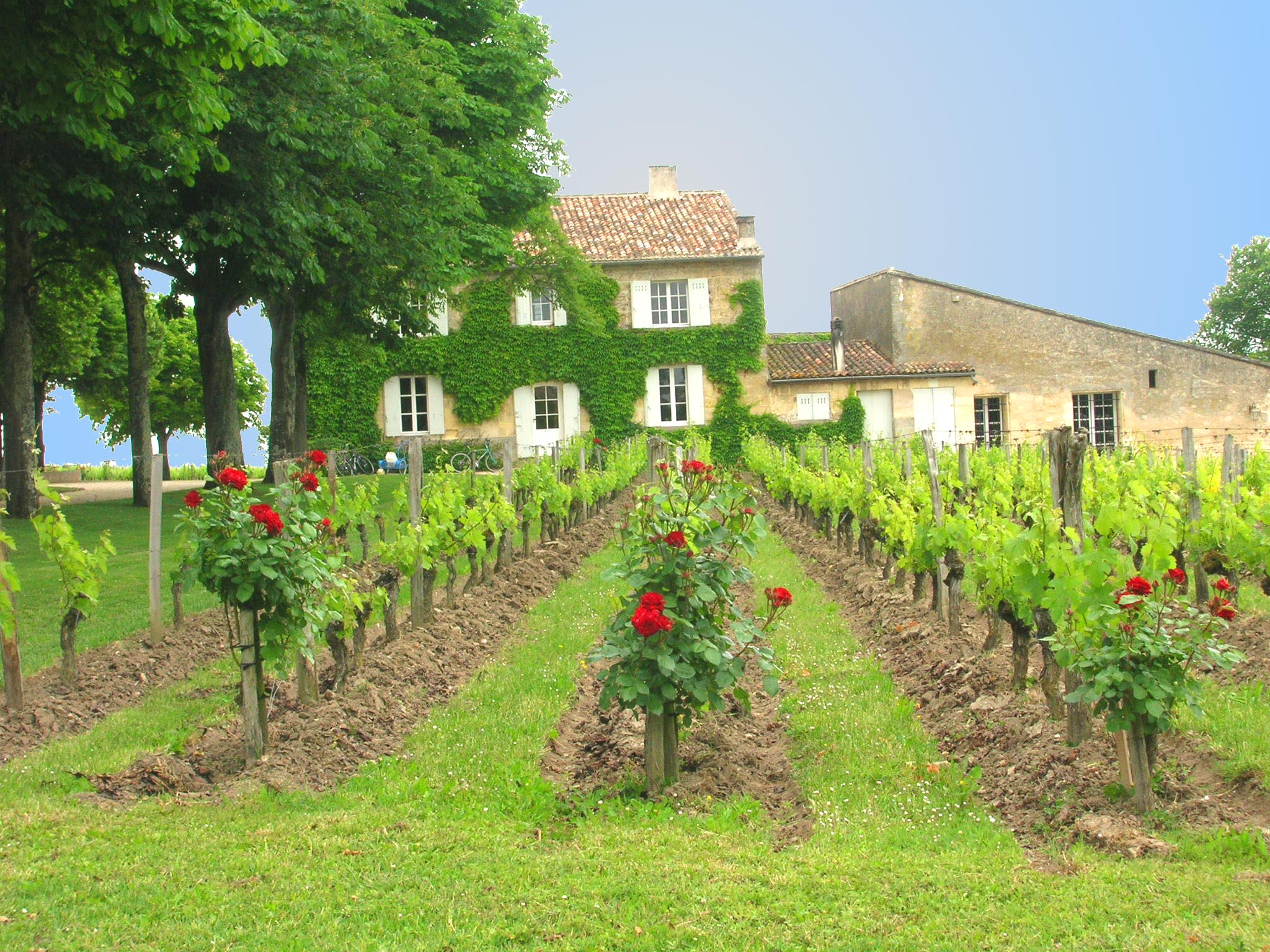 Wäigutt Cols Fourtet (2006)